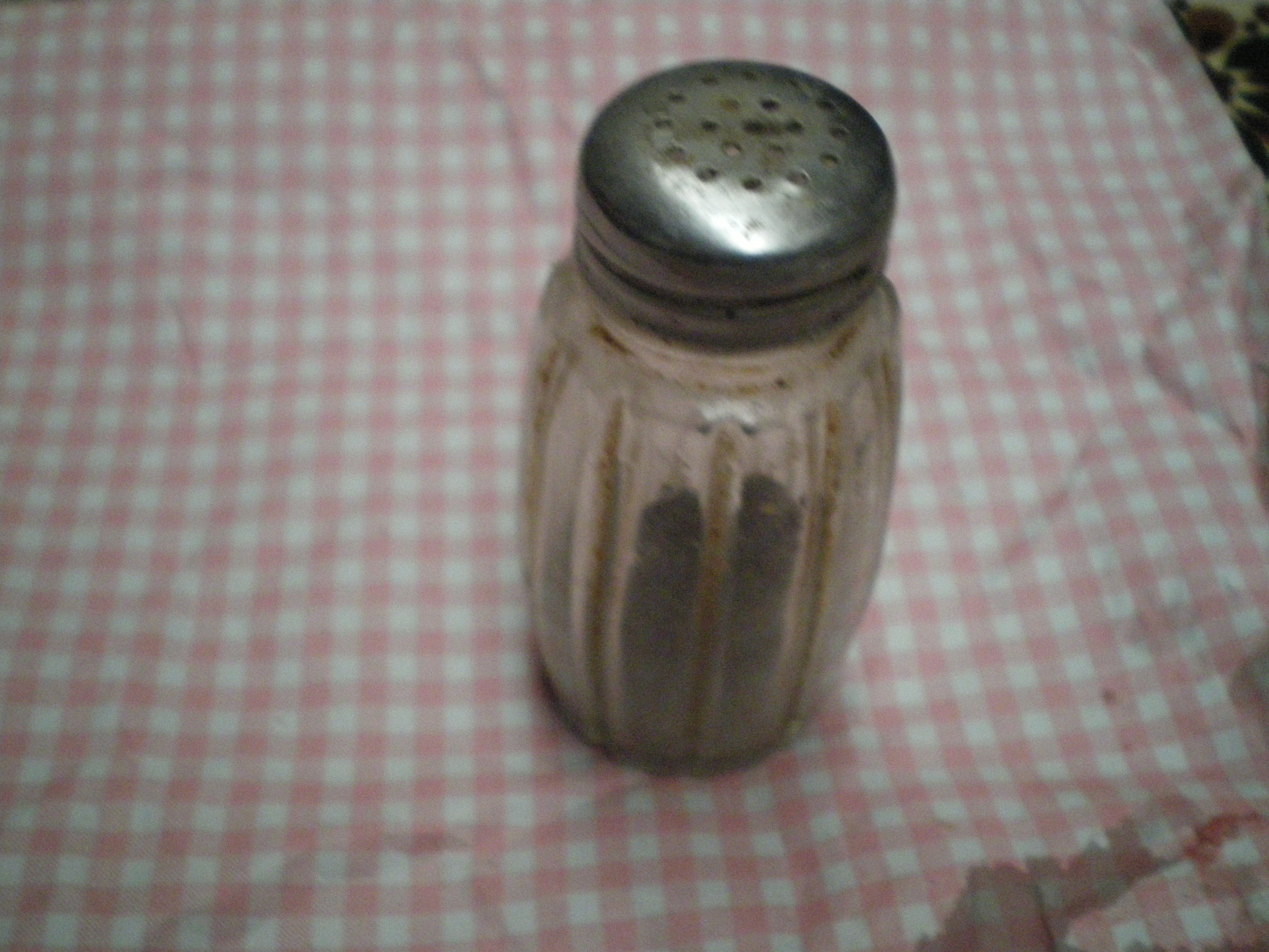 azertyuiop